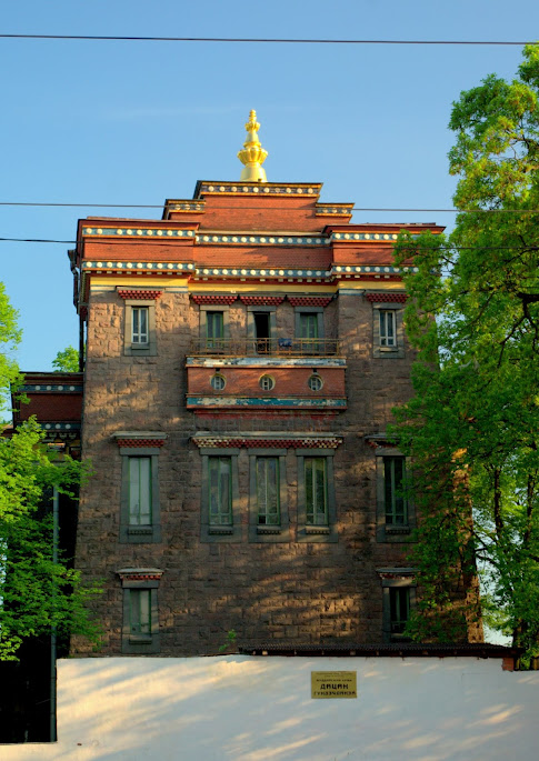 Санкт-Петербургский буддийский храм «Дацан Гунзэчойнэй»